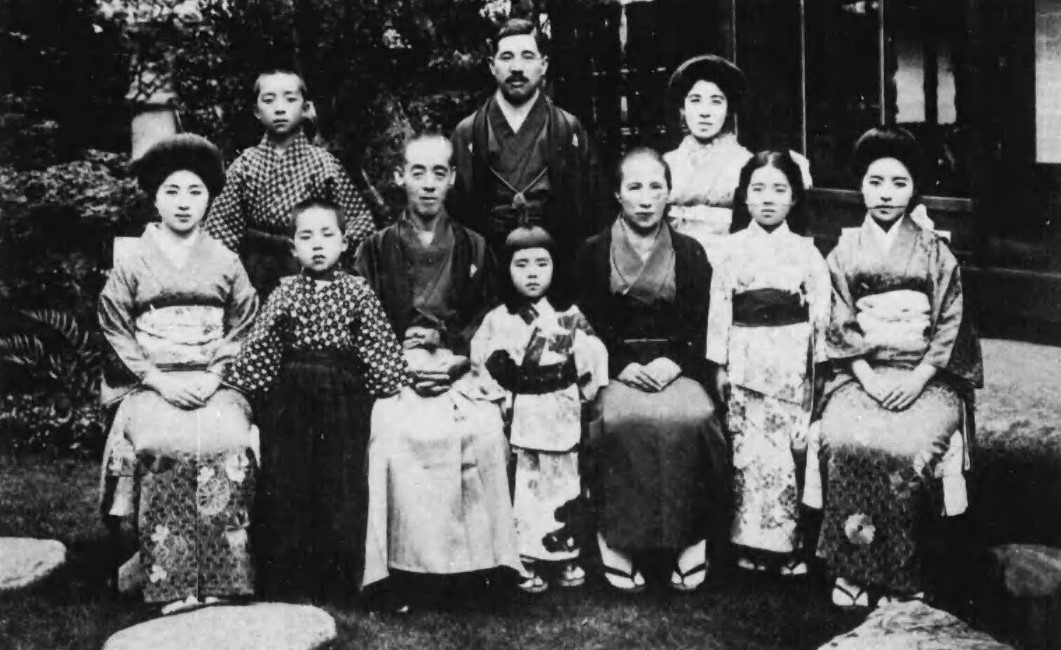 大沢善助と妻み保 徳太郎一家